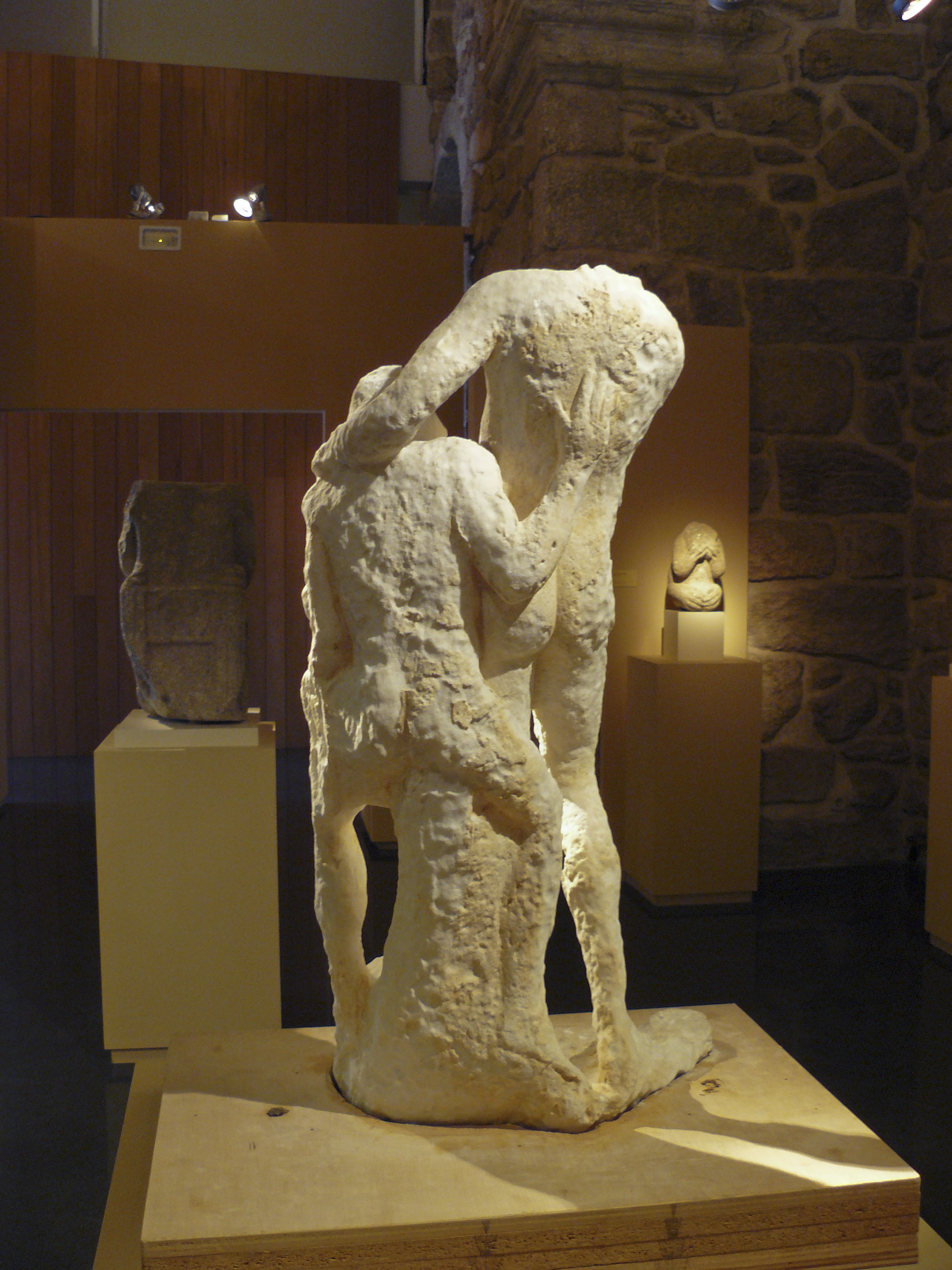 Detalle traseiro da Estatua de Dionisos e Sátiro